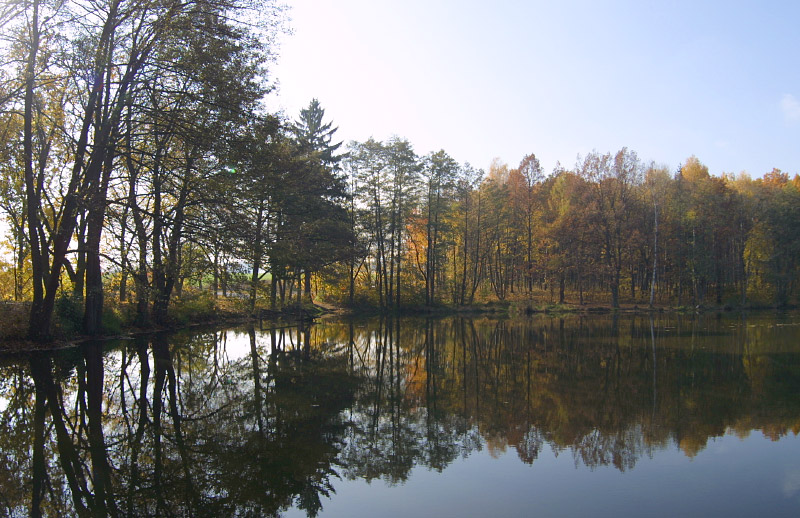 Hráz rybníku Oborák na Bučeckém potoce, mezi Sechuticemi a Olšanskou myslivnou.